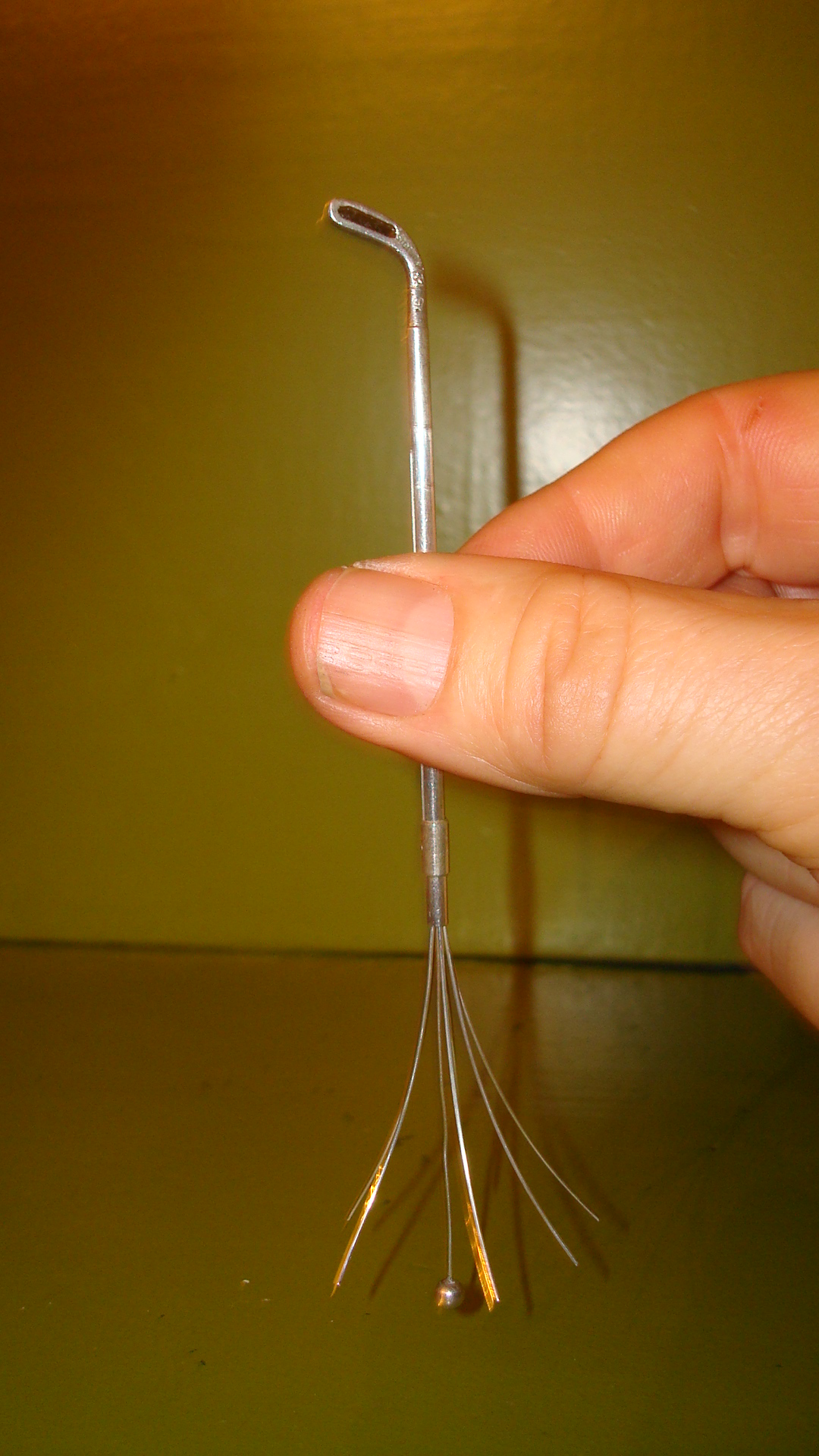 Champagnevisp i sølv formet som en golfkølle i miniatyr.